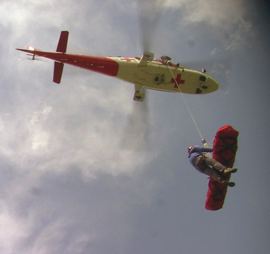 Agusta so záchranárom